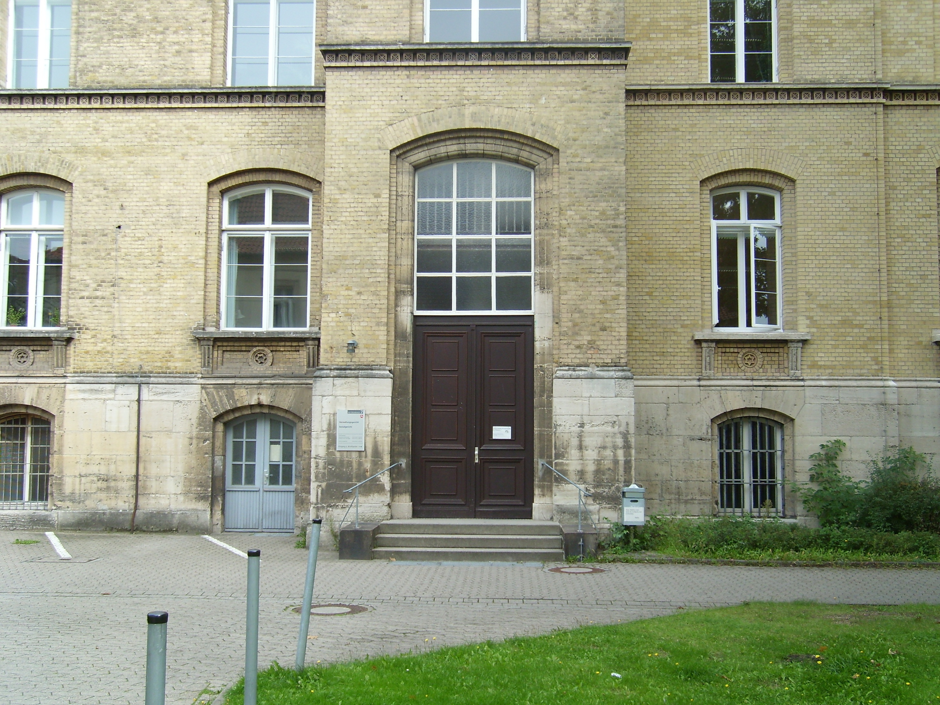 nur Personaleingang zum Sozialgericht Braunschweig und zum Verwaltungsgericht Braunschweig